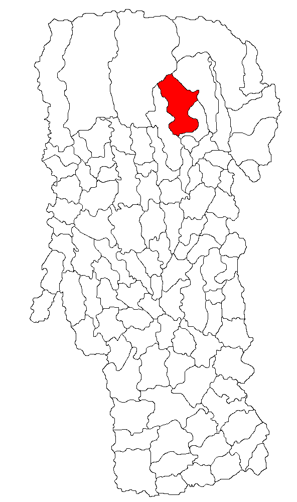 Categorie:Hărţi ale judeţului Argeş